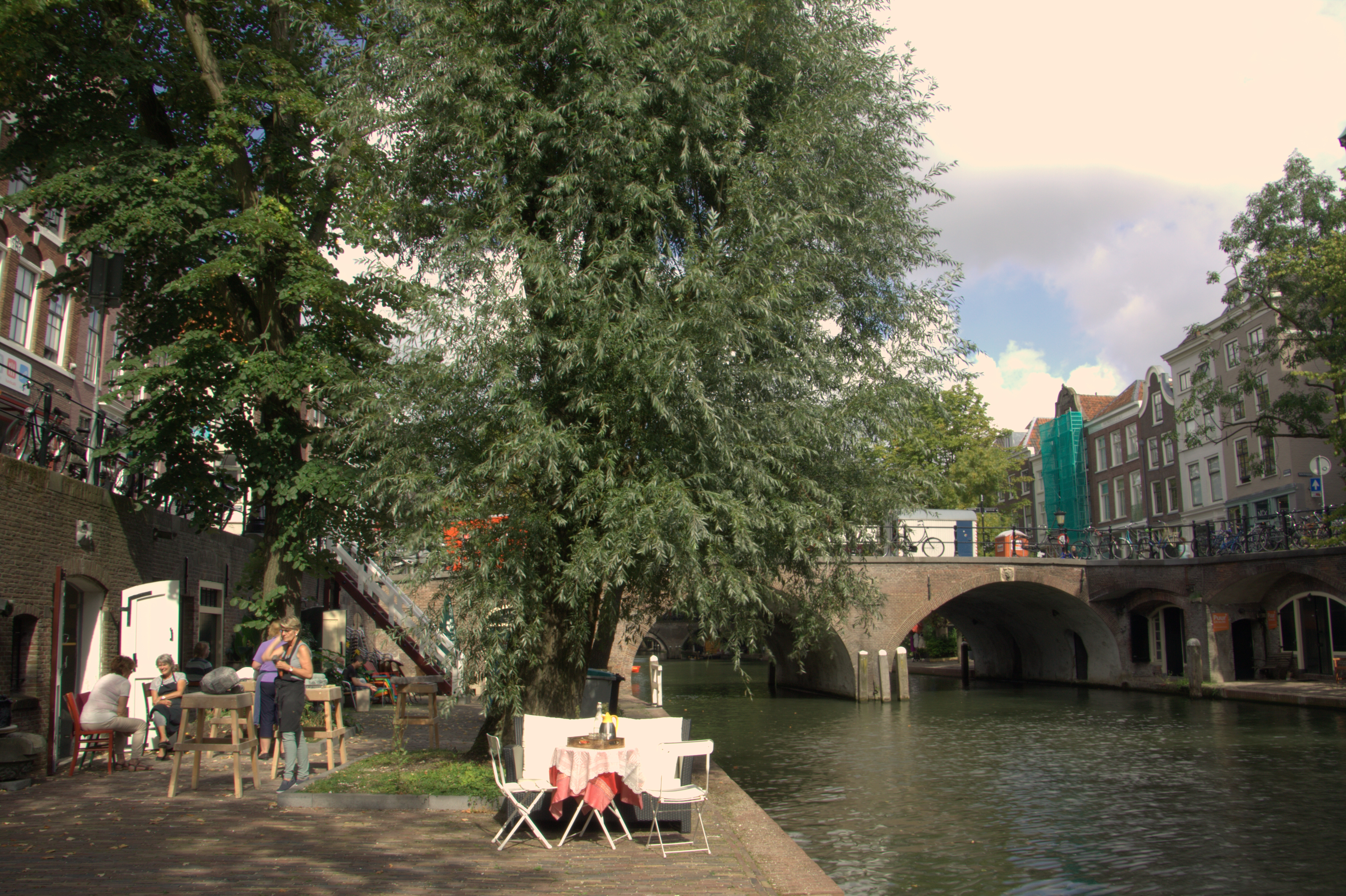 De Smeebrug genoemd naar het Gilde der Smeden in de stad Utrecht.